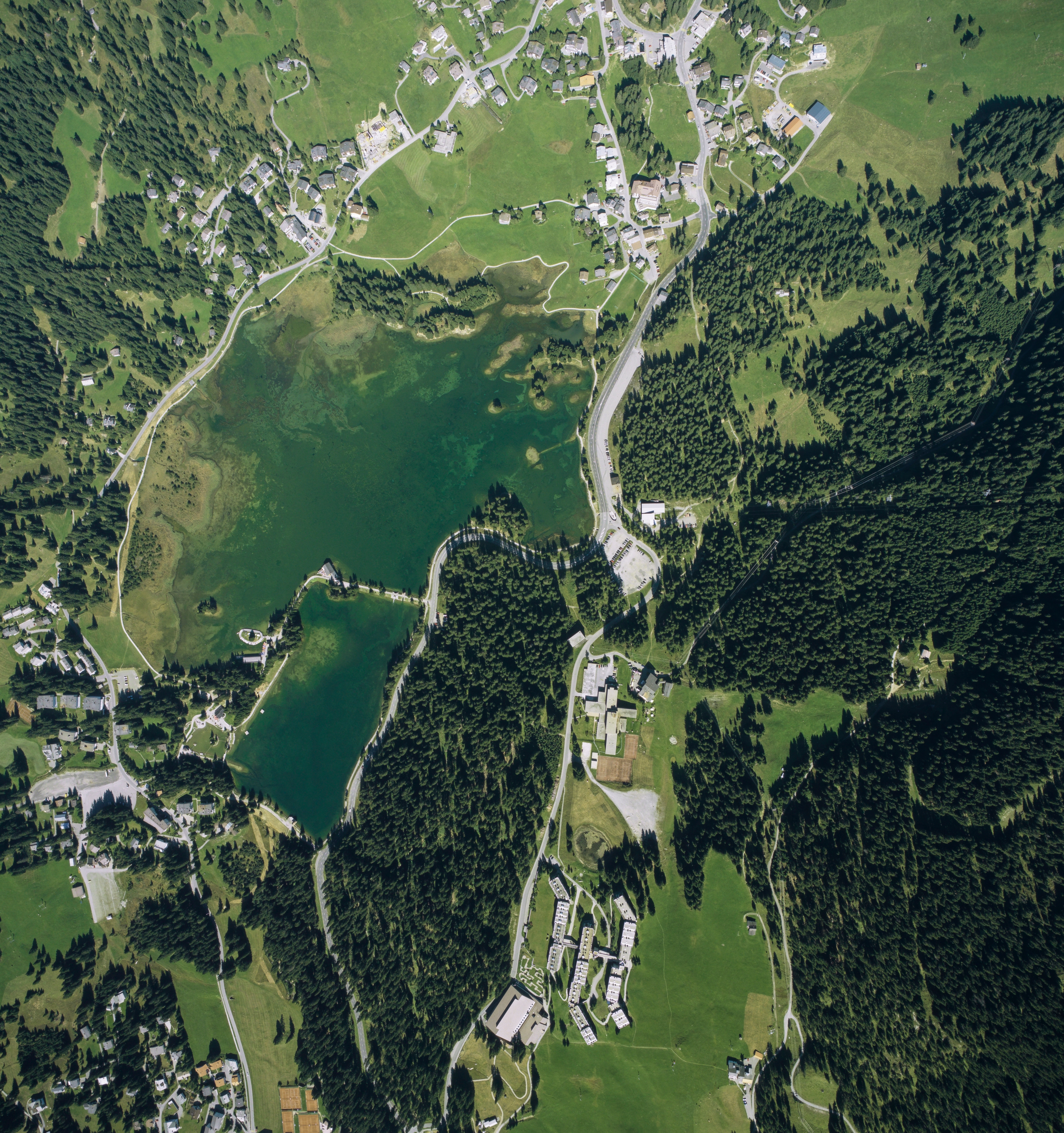 Heidsee bei Lnzerheide. Richtung Norden ist oben